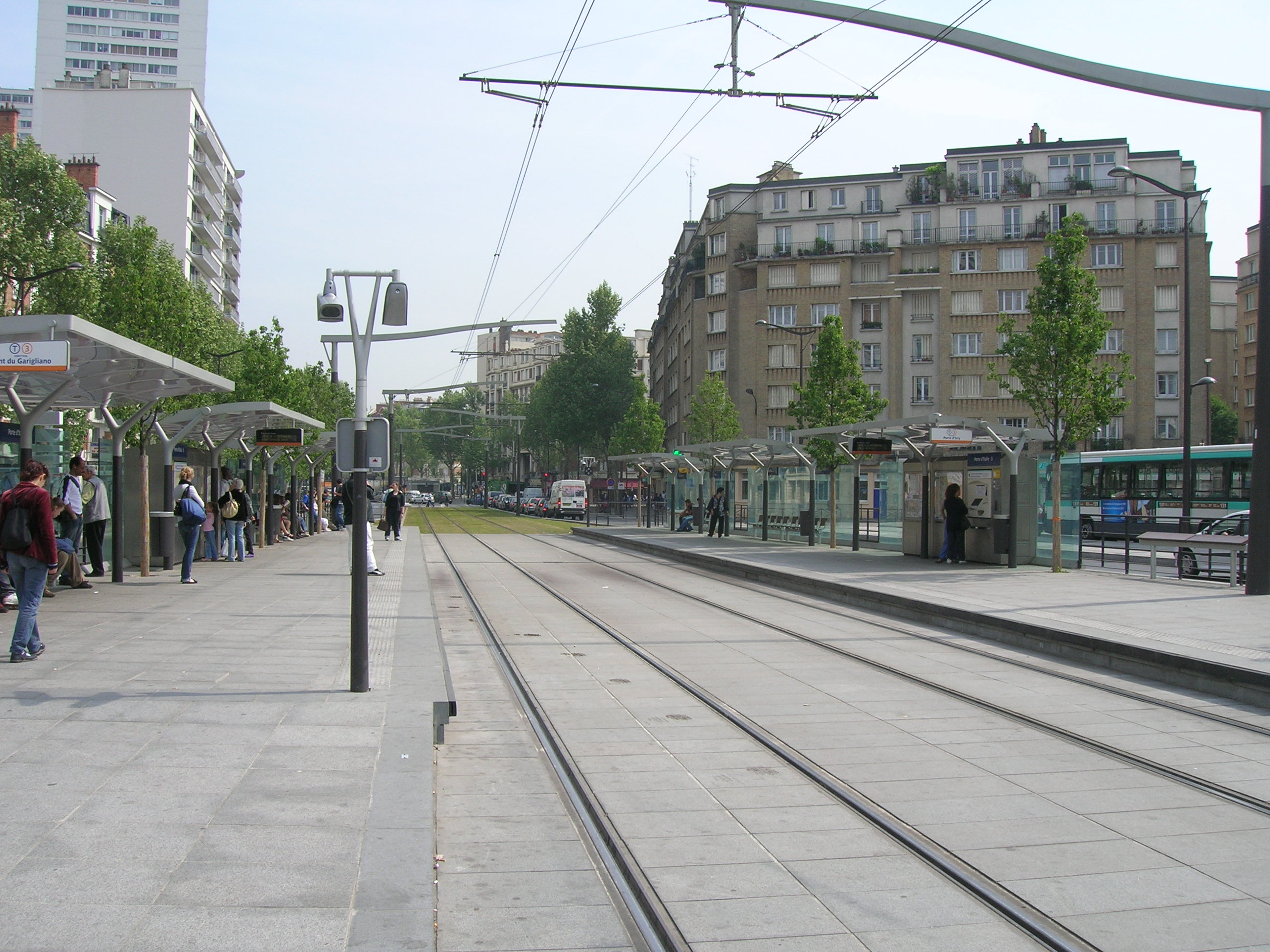 Station de tramway Porte d'Italie, ligne T3, Paris